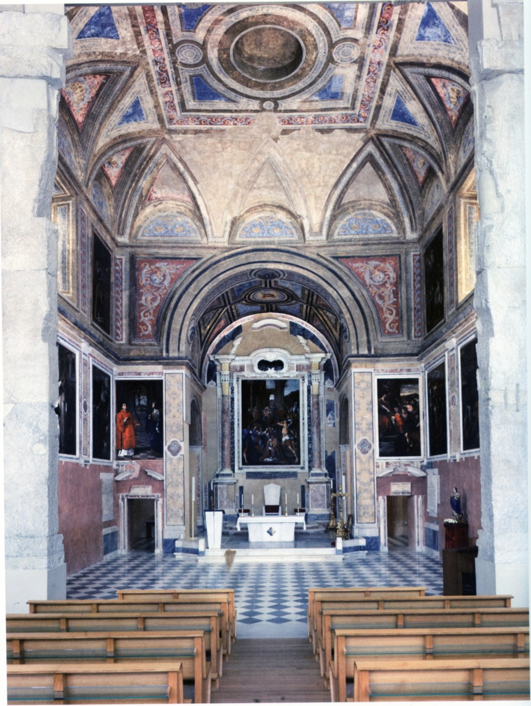 Tempio romano e Basilica Cattedrale di San Procolo martire di Pozzuoli